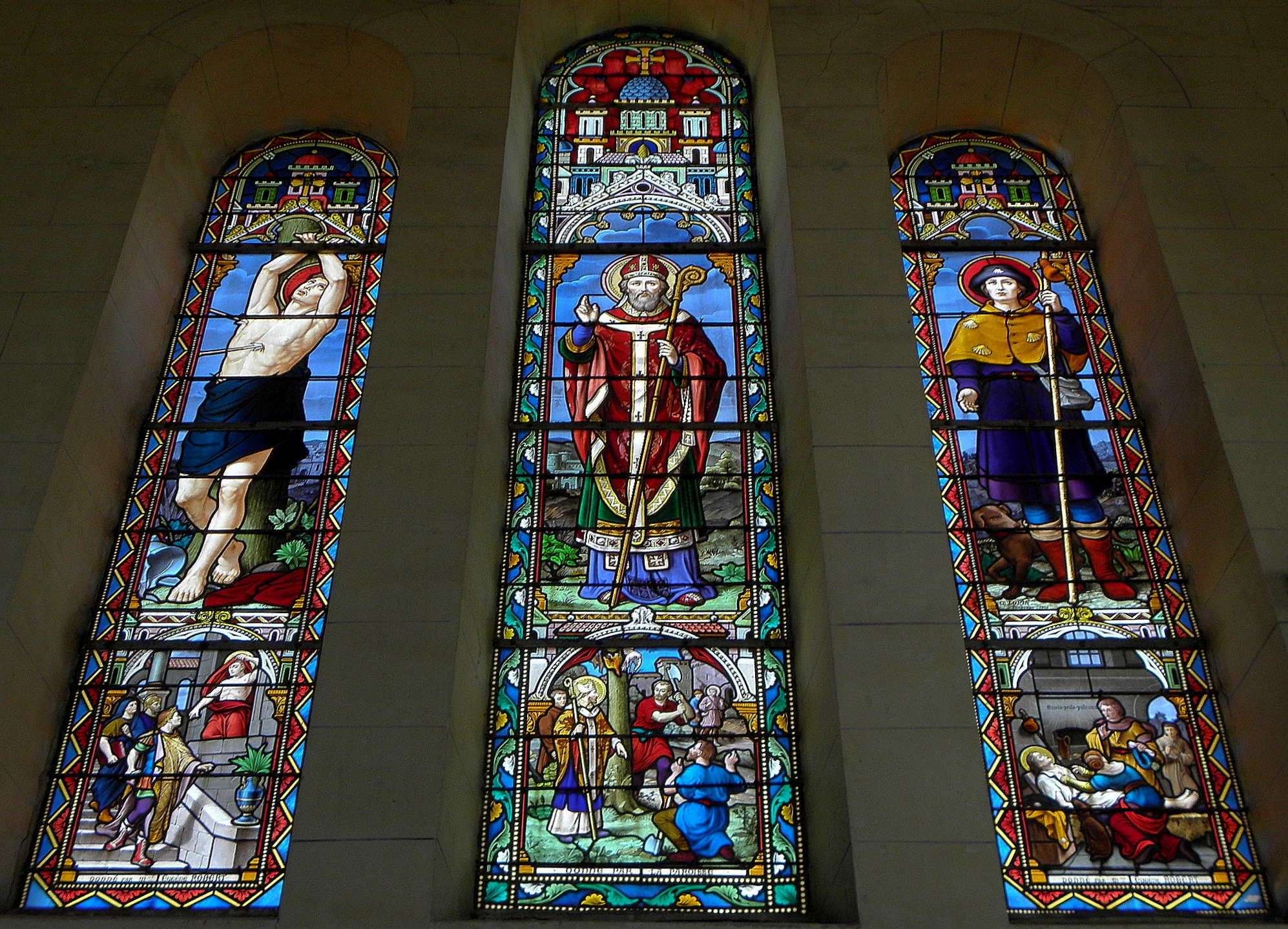 Vitrail de l'église de Saint-Germain-d'Anxure (53). Saint-Sébastien, Saint-Germain, Saint-Roch.